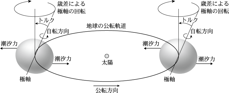 太陽や月の引力によって地球の極軸（自転軸）を起こそうとするトルクが働き、歳差運動を起こす。